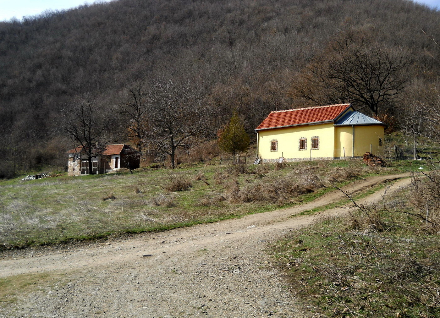 Манастир. Св. Николе